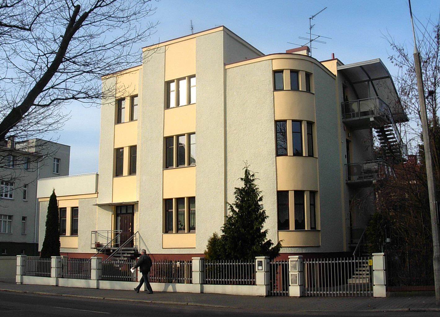 Dom al. Ossolińskich 11 w Bydgoszczy – zbud. 1932-1933, budowniczy Henryk Misterek